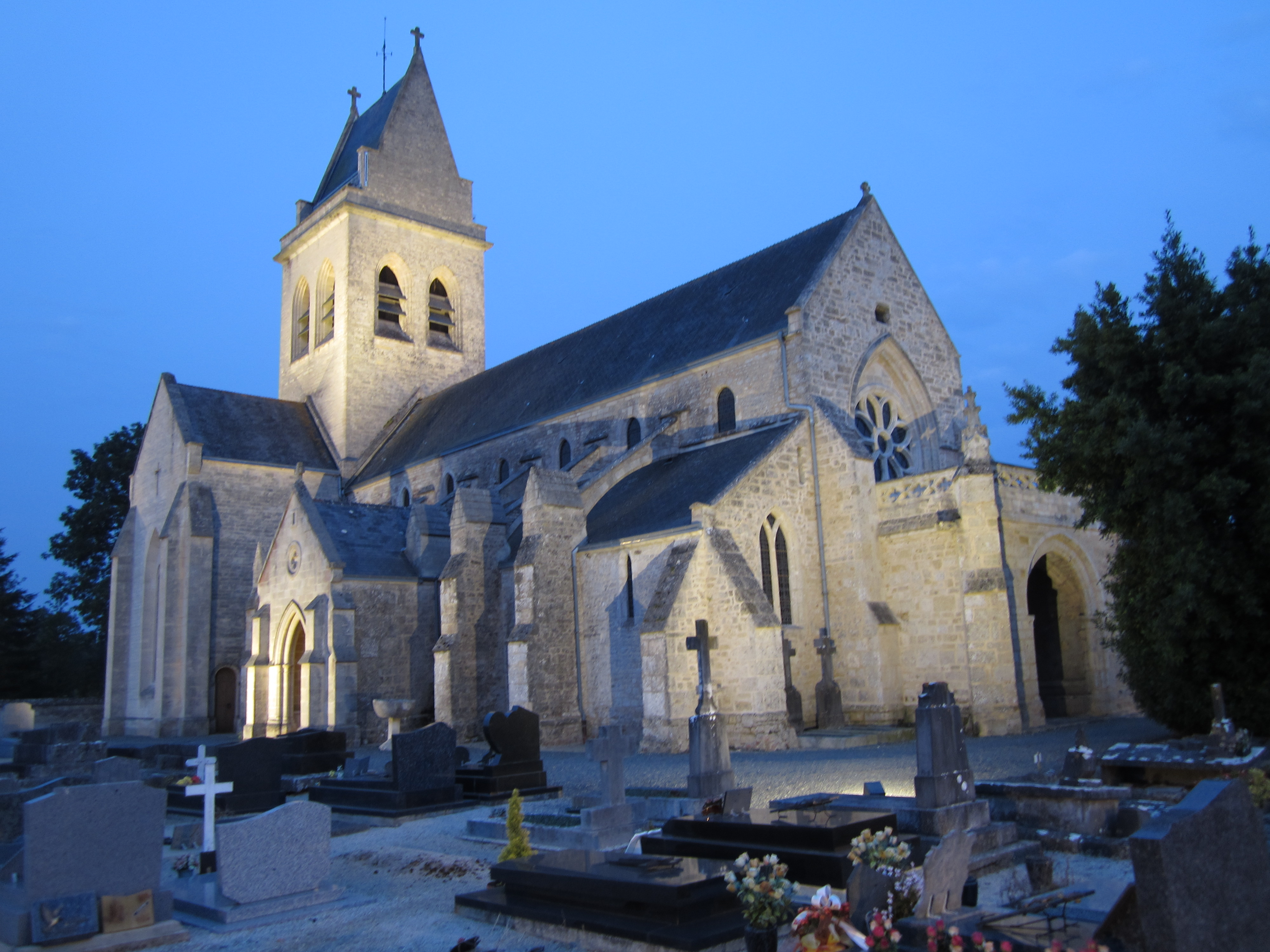 Église Saint-Pierre de Sainteny